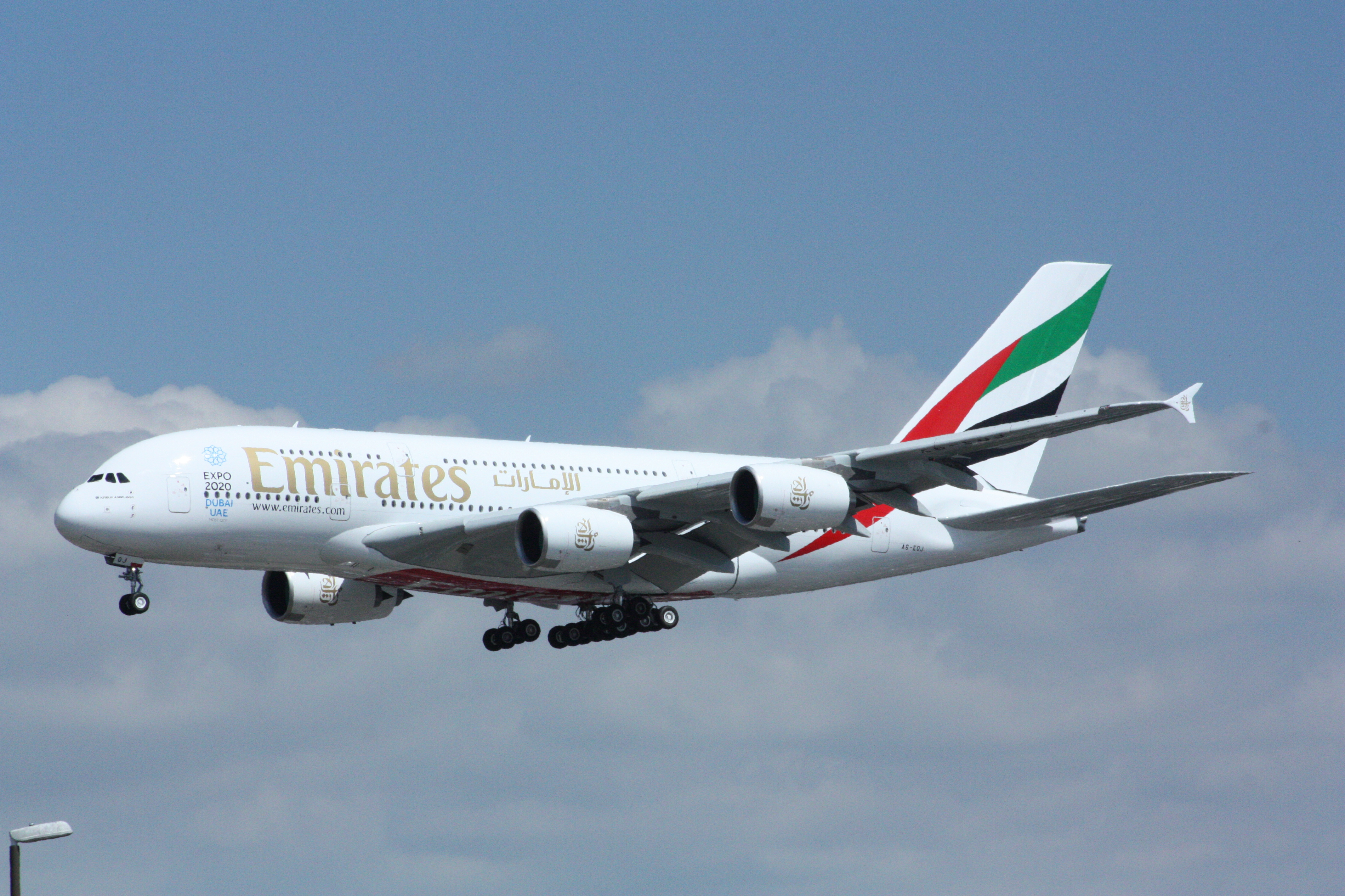 A6-EOJ